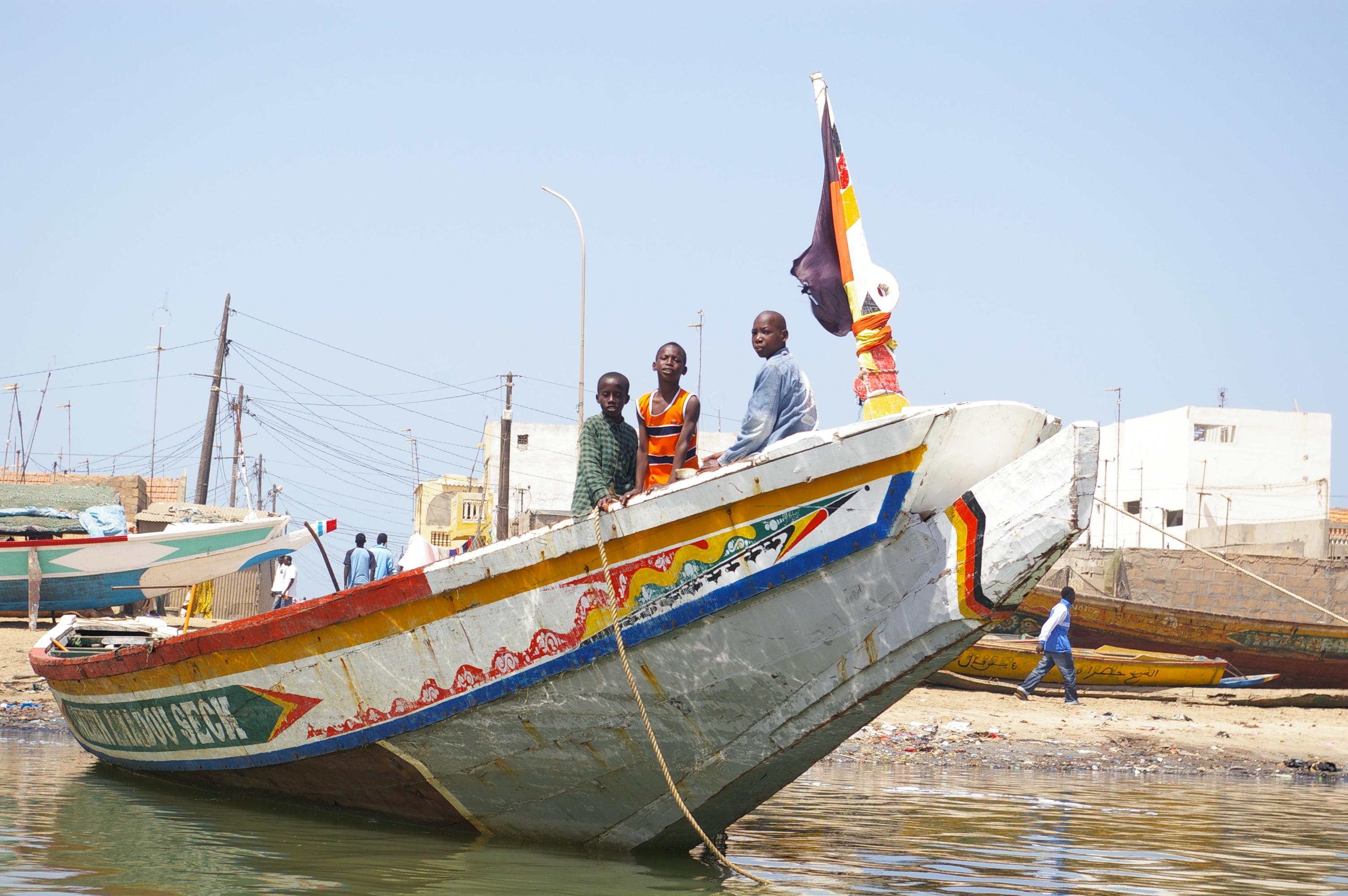 Fischerboot in St.Louis Senegal mit schwarz-rot-golder Flagge